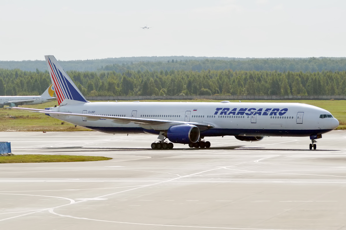 Transaero, EI-UNP, Boeing 777-312